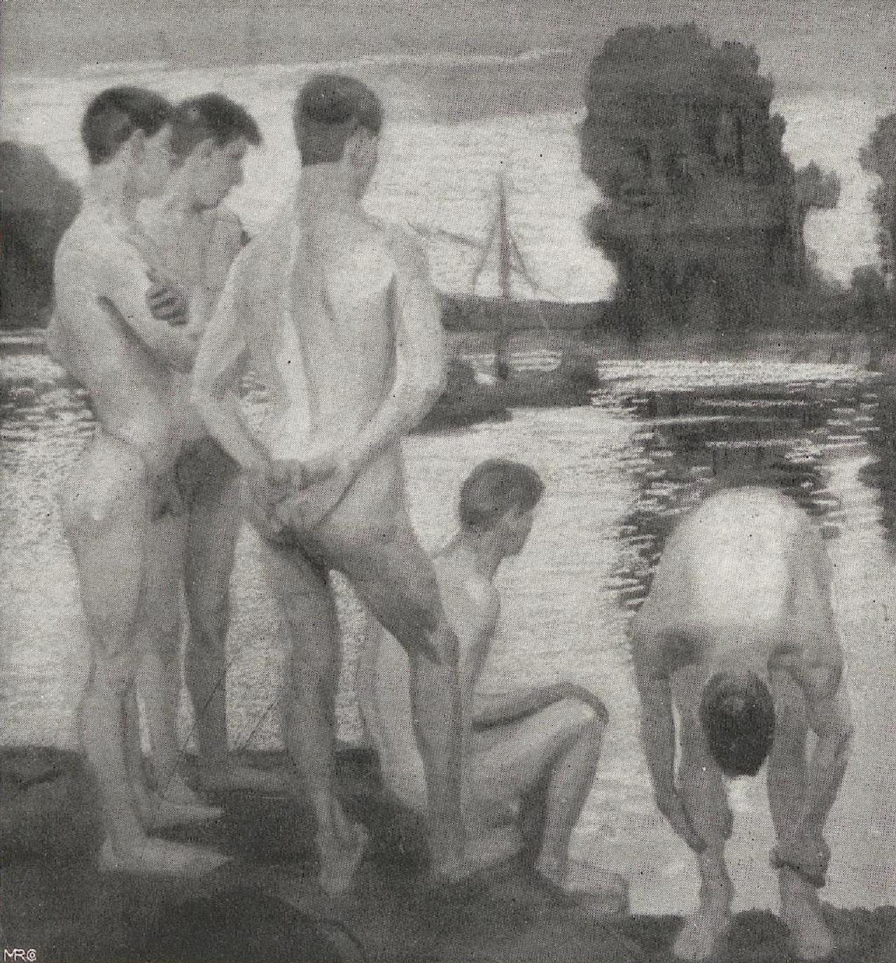 Gemälde Am Ufer von Oswald Galle, auf der Ausstellung der Berliner Secession 1910